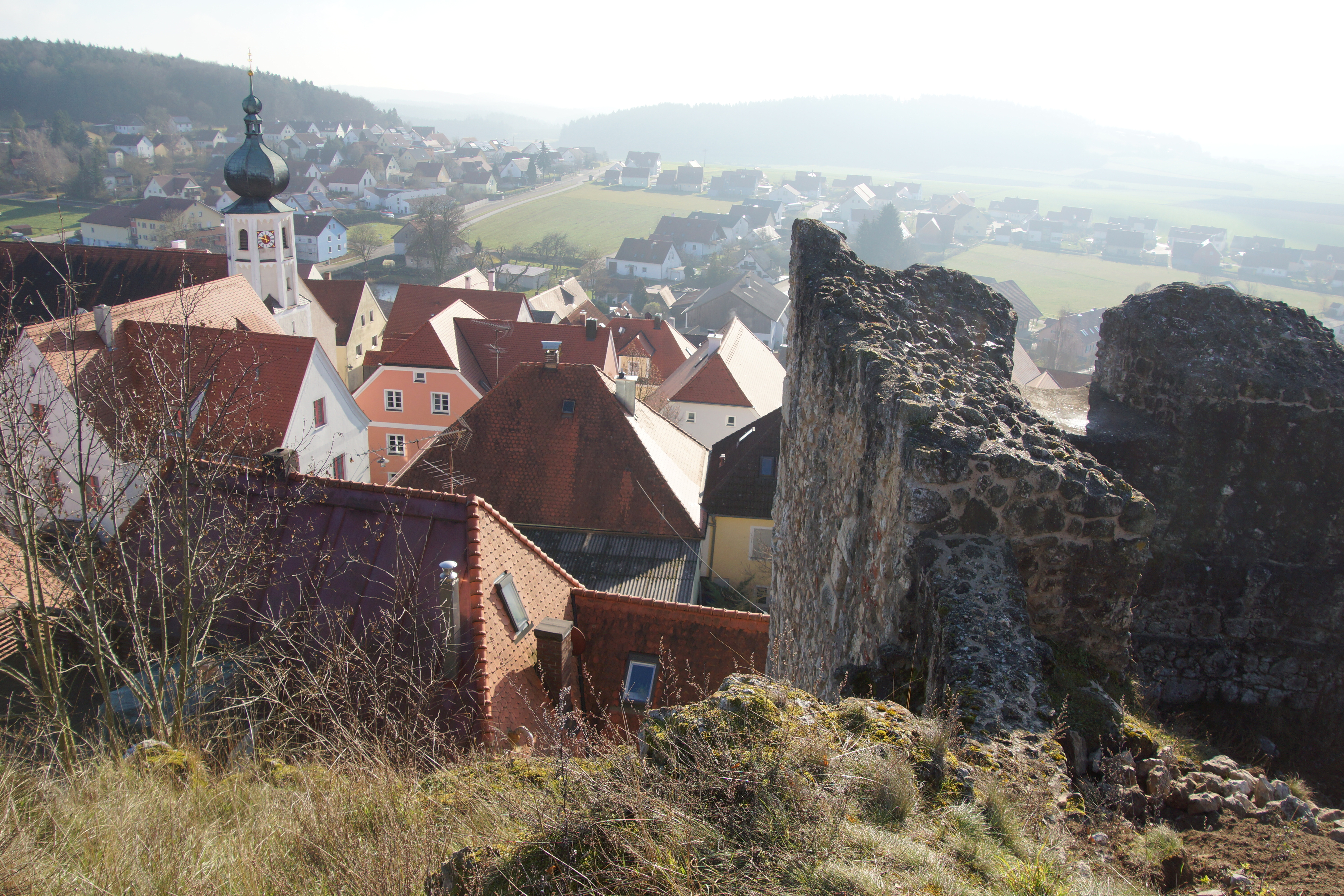 Die Burg Lupburg in der Oberpfalz